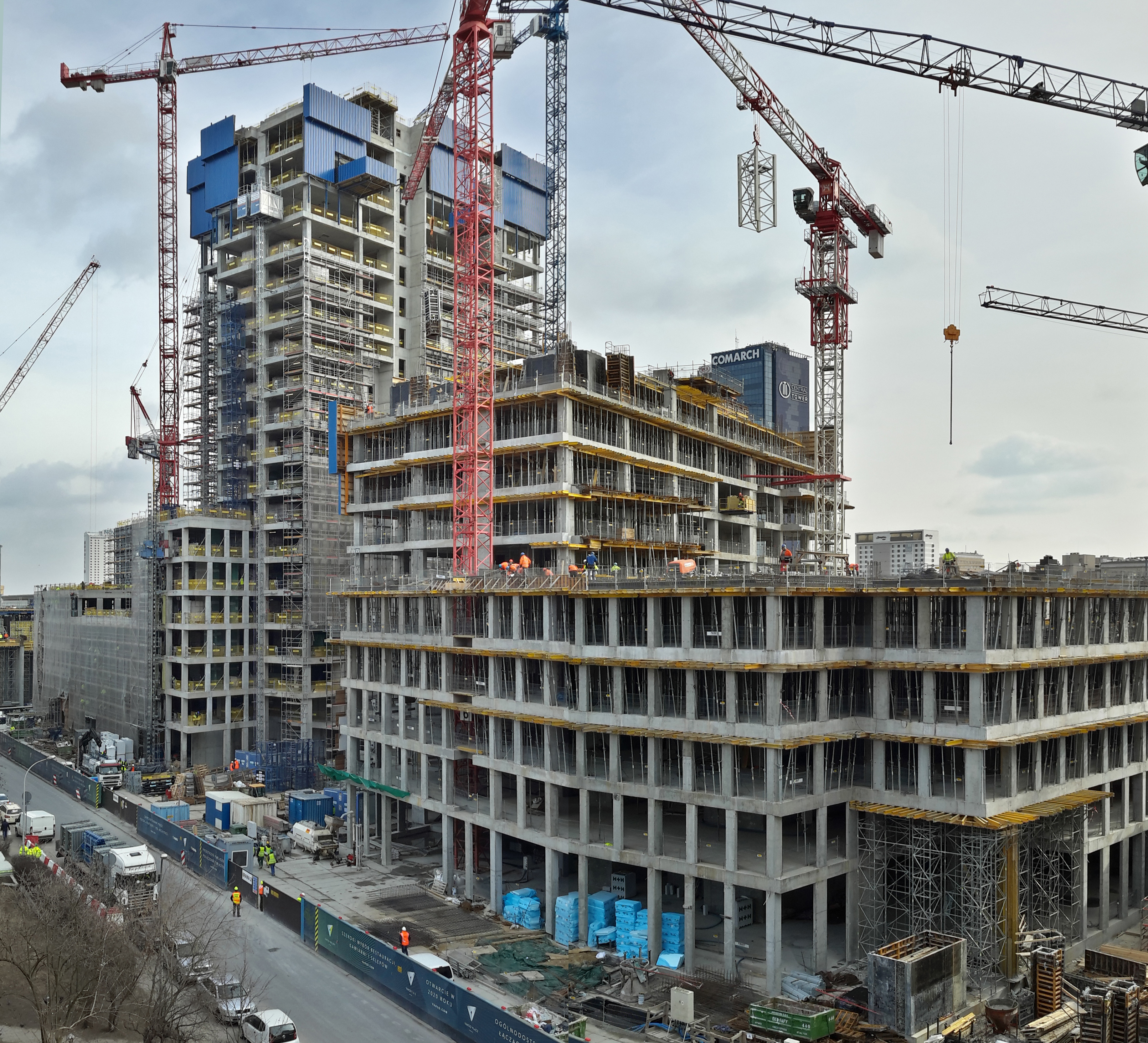 Plac budowy Varso 1 marca 2019